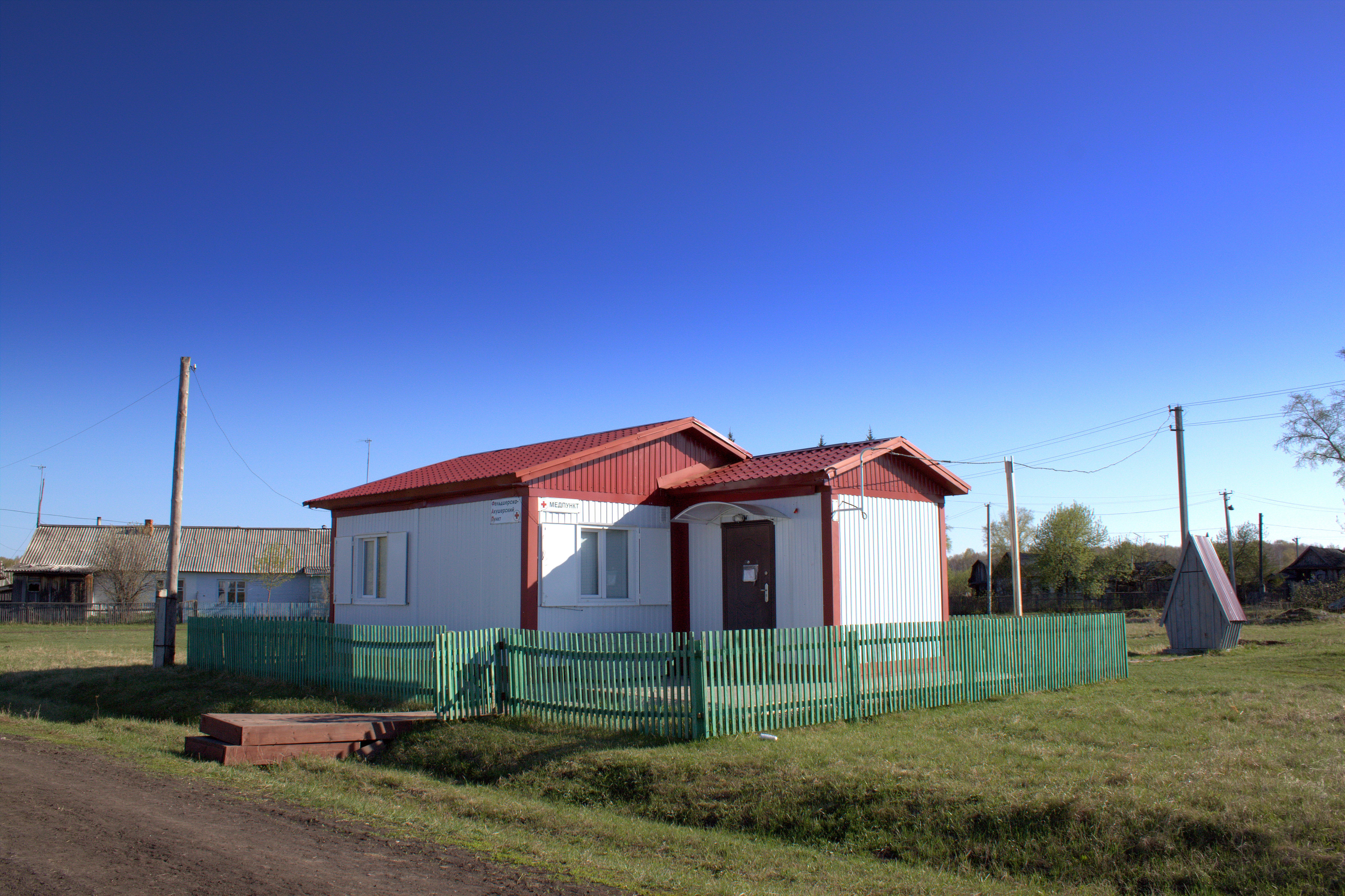 ФАП в посёлке Восток Абатского района Тюменской области.